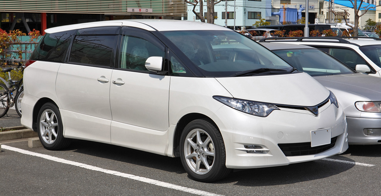 Toyota Estima Aeras ( ACR50W )